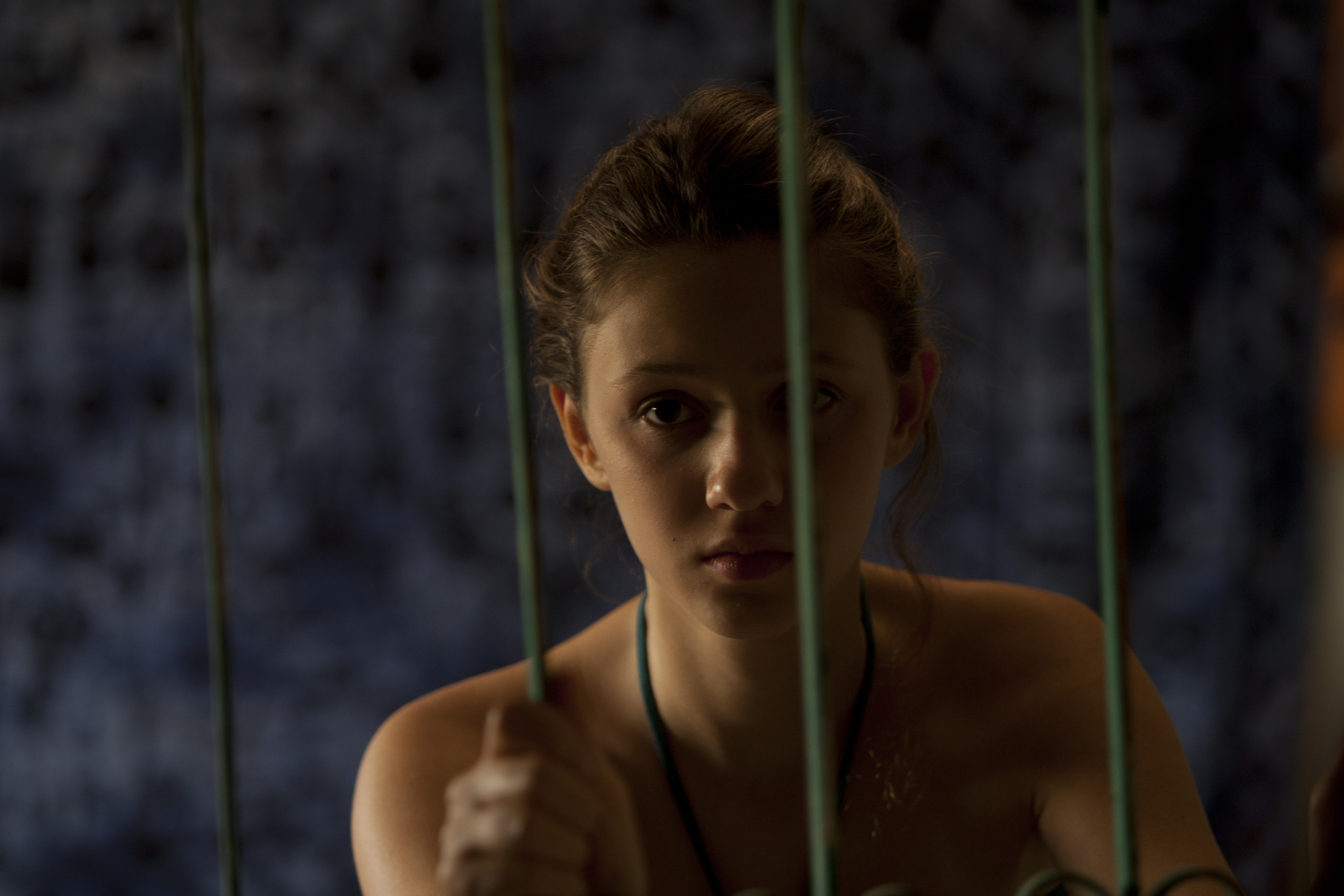 תמר פרמינגר בסצינה מהסרט "החיים בינתיים"